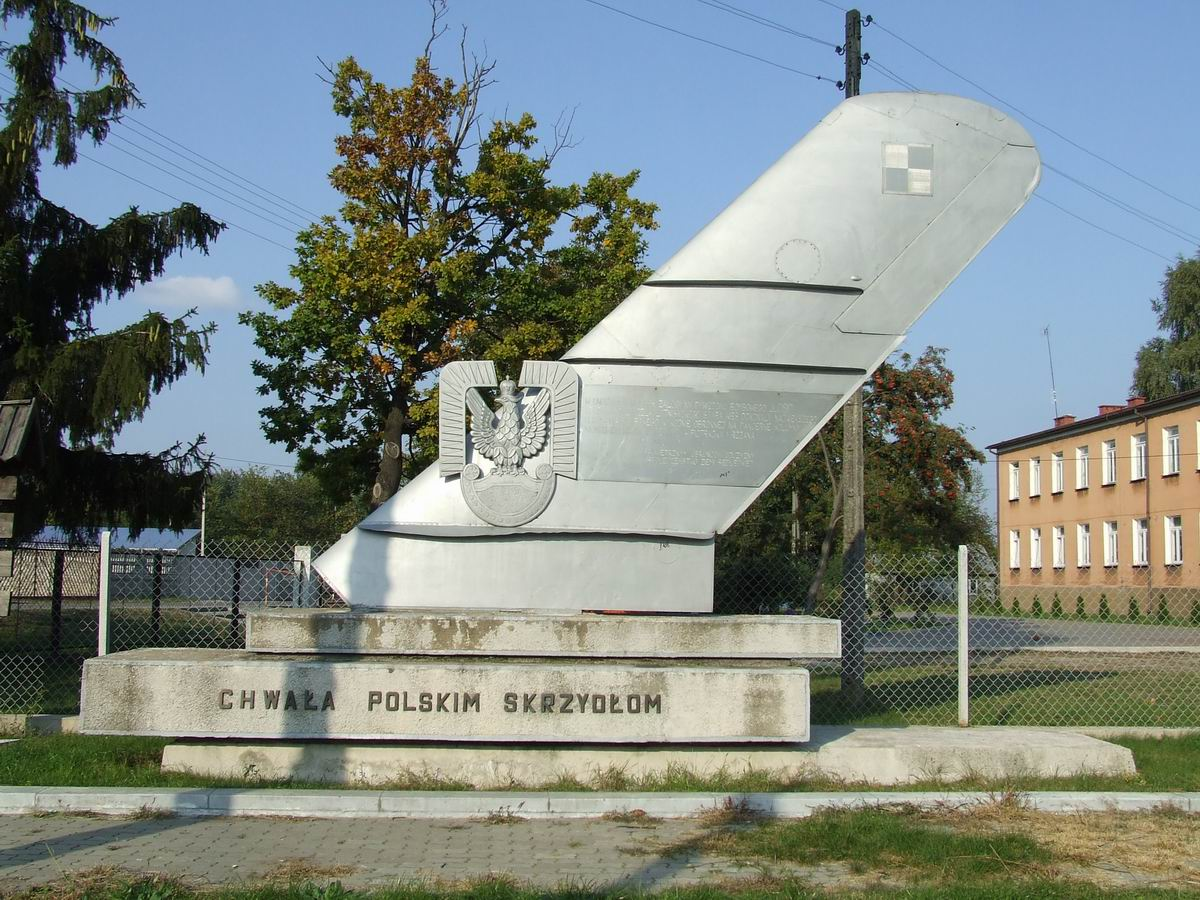 Starawieś koło Węgrowa w gminie Liw, pomnik upamiętniający naloty Łosi w 1939